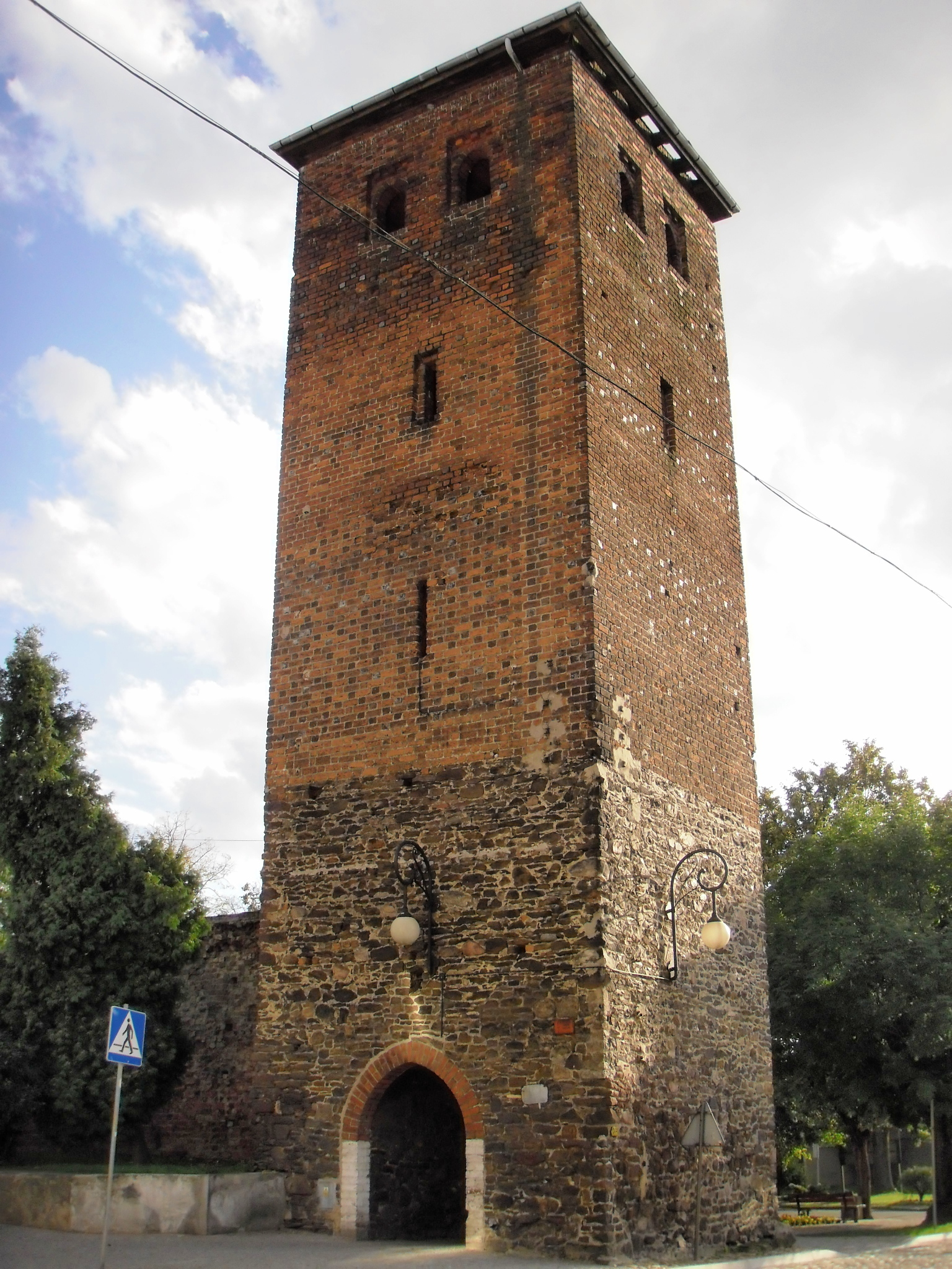 Byczyna, Brama Niemiecka, XV-XVI